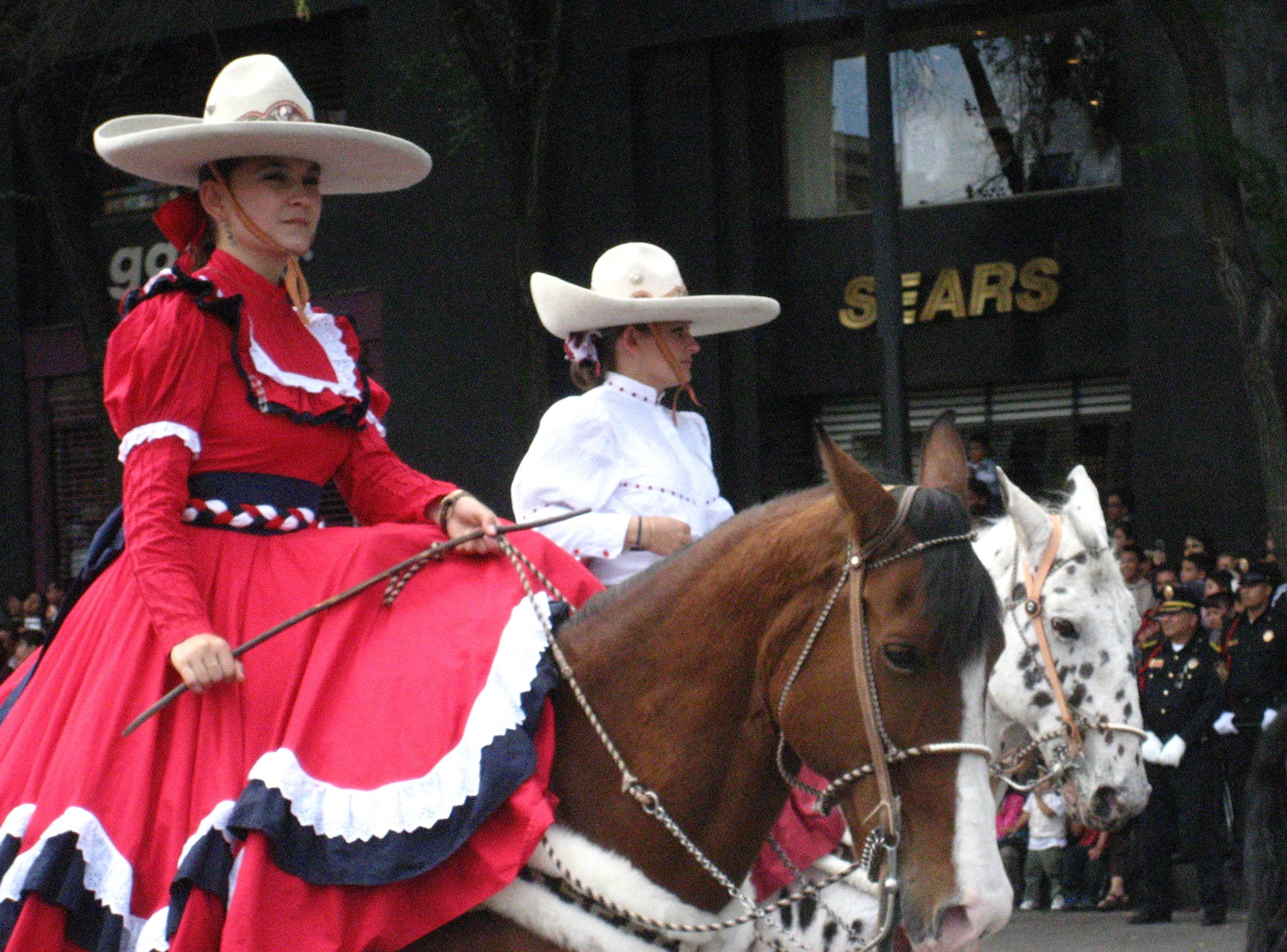 charros mexiko 16 septiembre 2009